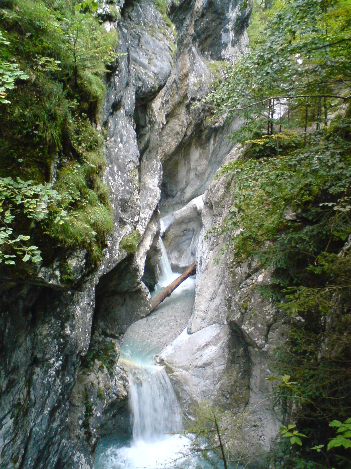 Garnitzenklamm This media shows the natural monument in Carinthia with the ID He 13.